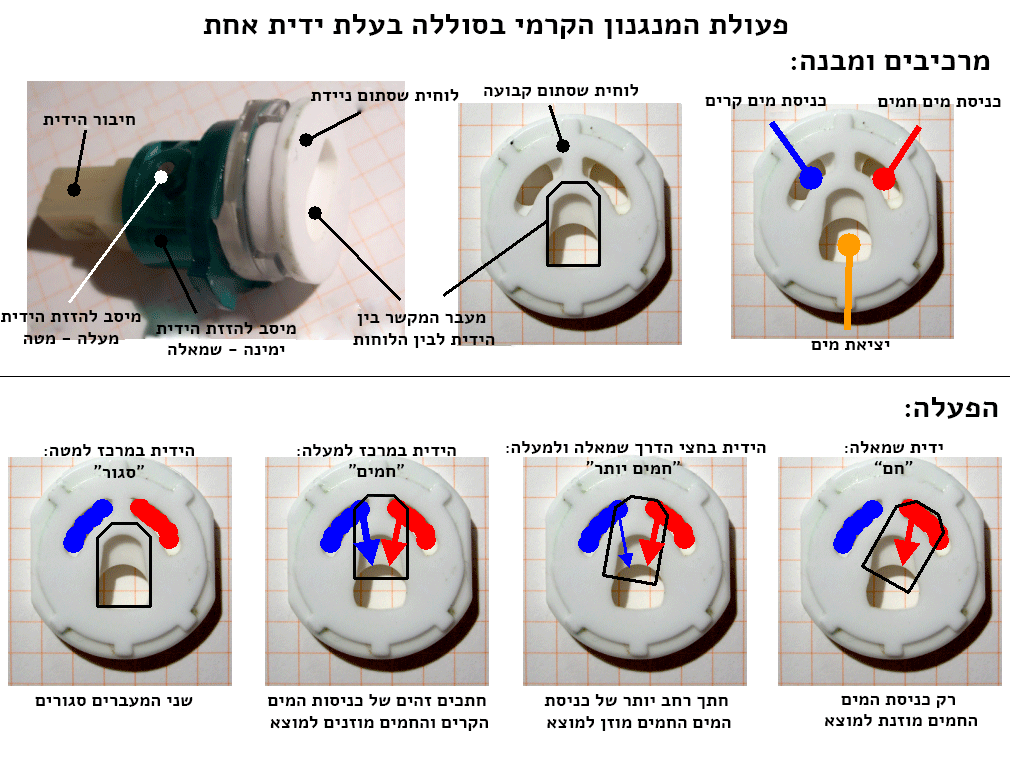 אופן הפעולה של ברז אינטרפוץ